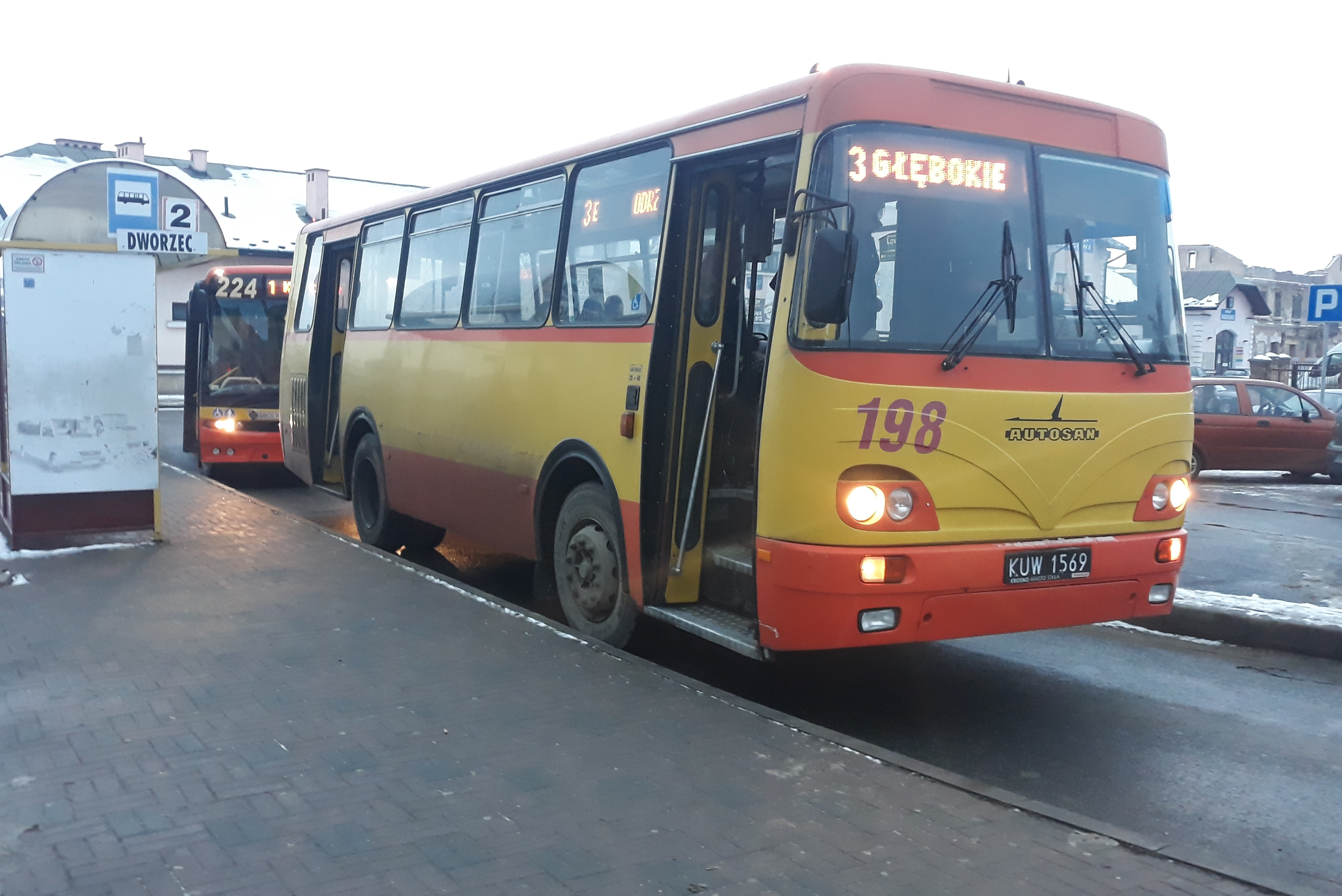 Autobus Autosan H9-35 należący do MKS Krosno podczas obsługi linii "3"